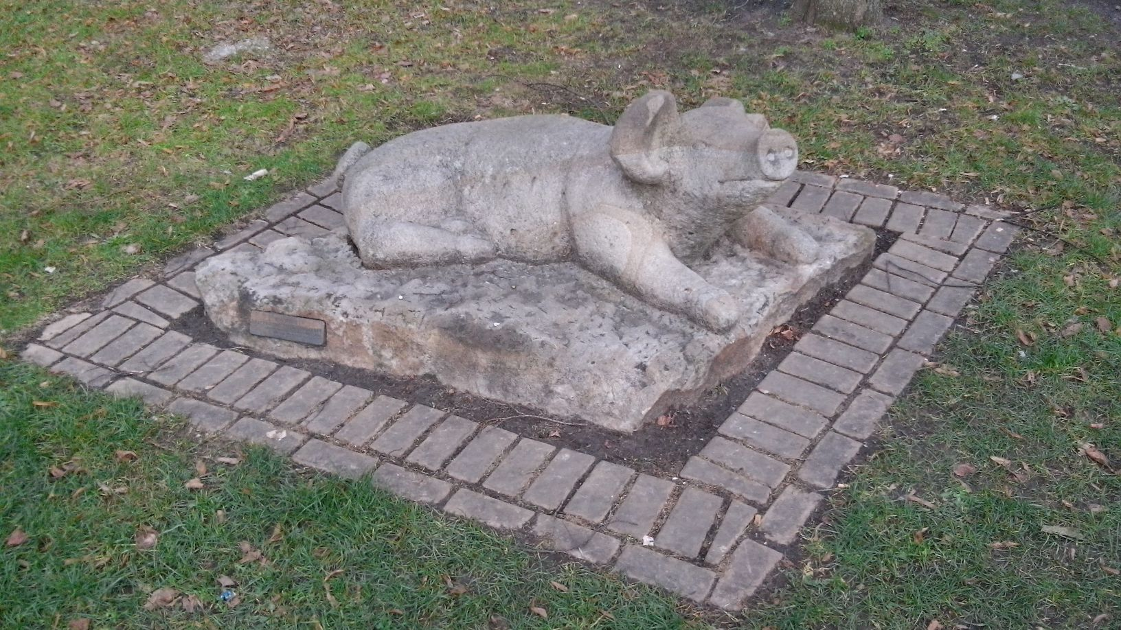 Schweine-Denkmal an der Hauptstraße in Bielefeld-Brackwede. Erinnerung an den 550. Schweinemarkt. Gestifet von Uwe A. Jauer und gestaltet von Anne Katrin Stork.